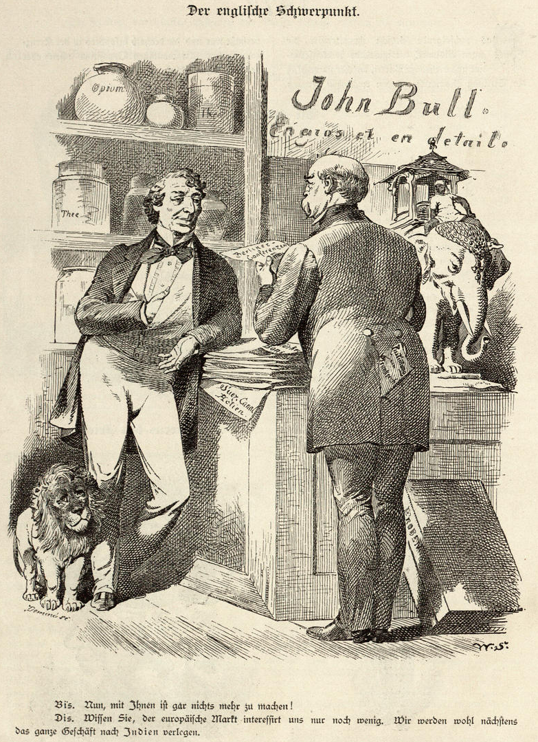 Karikatur „Der englische Schwerpunkt“ aus dem Kladderadatsch, 1875. Die Bildunterschrift lautet: Bis. „Nun, mit Ihnen ist gar nichts mehr zu machen!“ Dis. „Wissen Sie, der europäische Markt interessiert uns nur noch wenig. Wir werden wohl nächstens das ganze Geschäft nach Indien verlegen.“